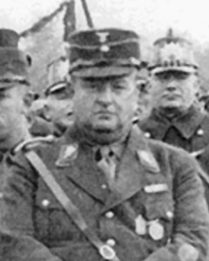 Hanns Löhr anläßlich der Einweihung des Tiemann-Gedenksteines in Bielefeld-Ummeln im Oktober 1933 (Ermordung des Landpolizisten August Tiemann in 1932)